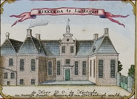 Huis Rikkerda in Lutjegast. Uitsnede uit de kaart van Theodorus Beckeringh uit 1781